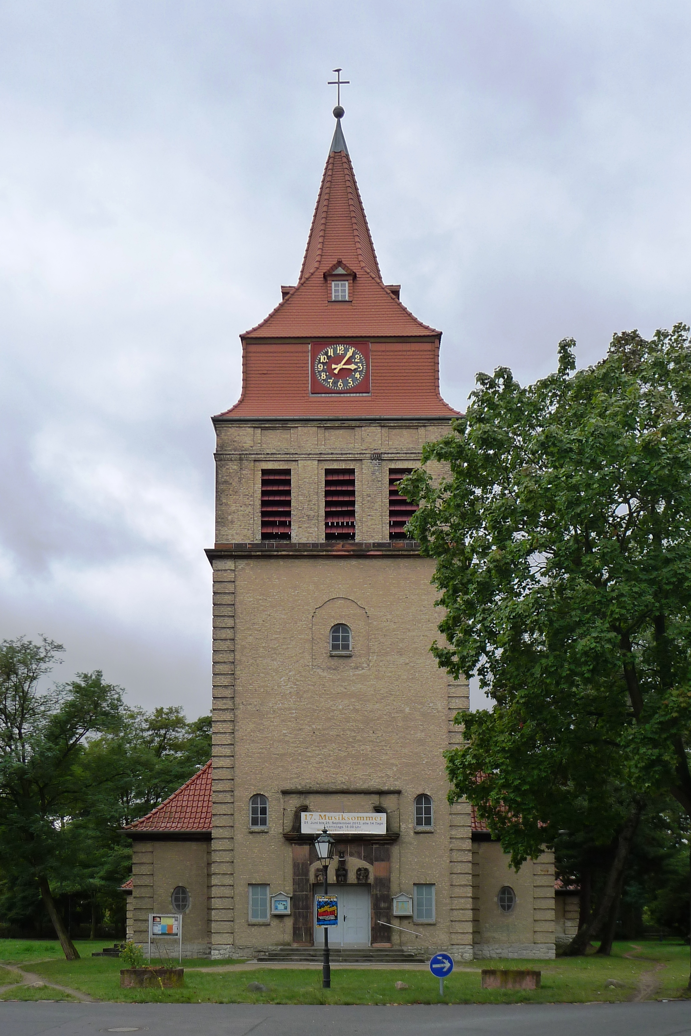 Wenn man vom S-Bahnhof Wilhelmshagen die Schönblicker Straße, erscheint bereits in der Ferne die Kirche.